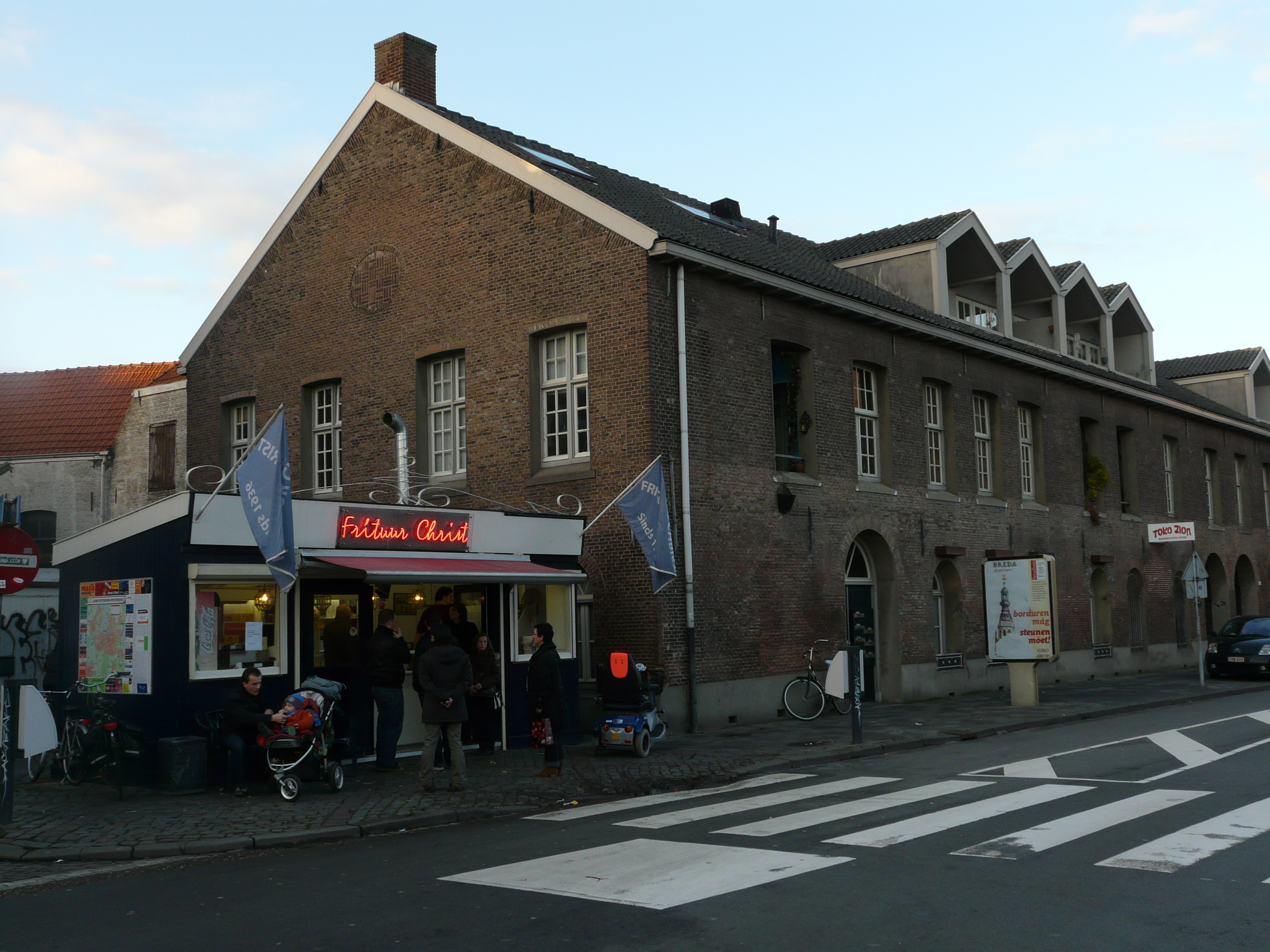 Zicht op de frietzaak van Frituur Christ en de Lange Stallen in een deel van de Keizerstraat, Breda. Gelegen nabij het centrum van Breda in Breda